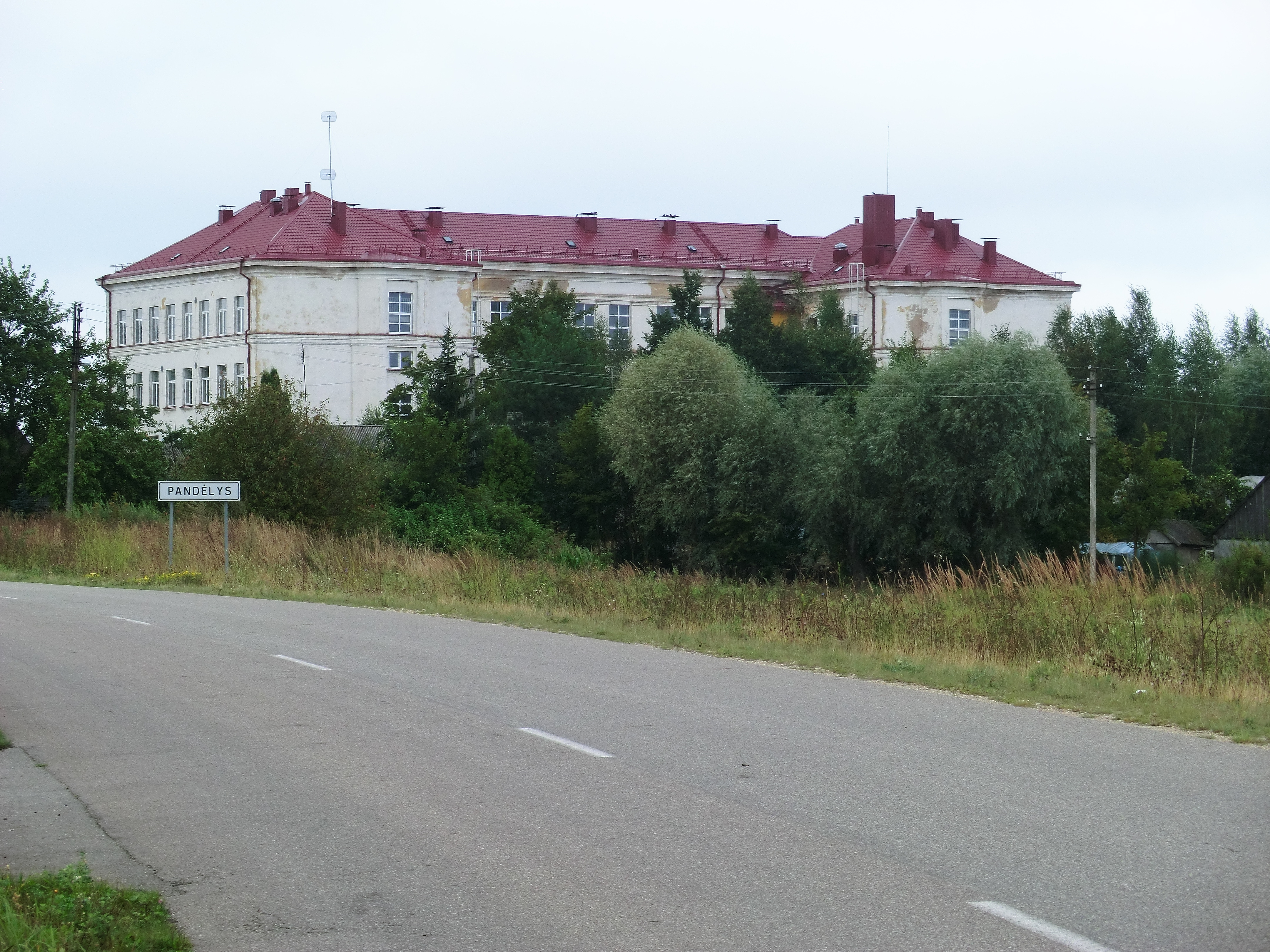 въезд в Панделис